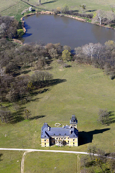 Kégl-kastély, Csalapuszta